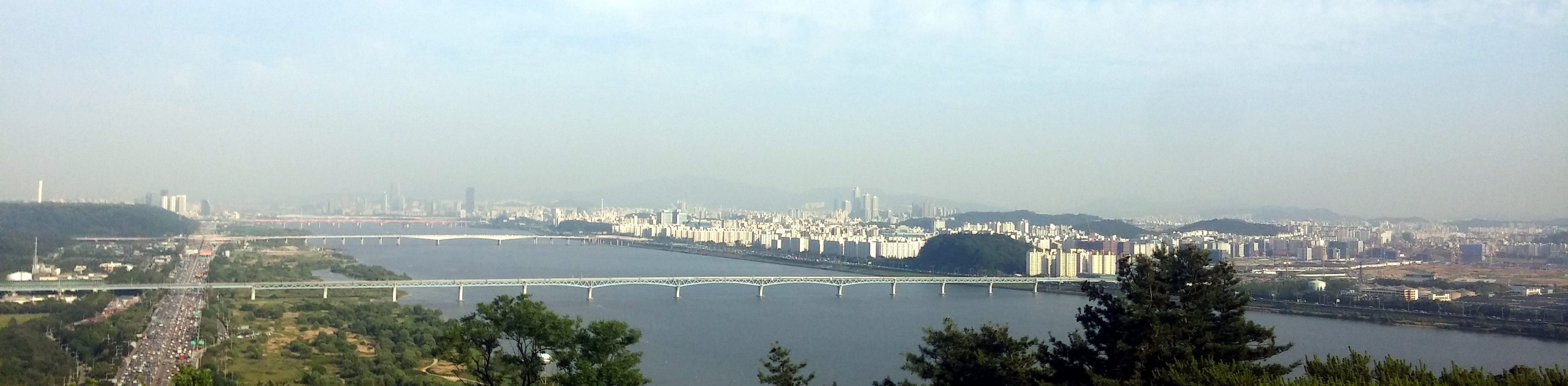 마곡대교. 뒤쪽의 다리는 순서대로 가양대교, 성산대교.